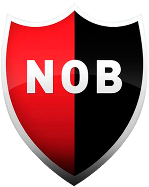 escudo nob 2016